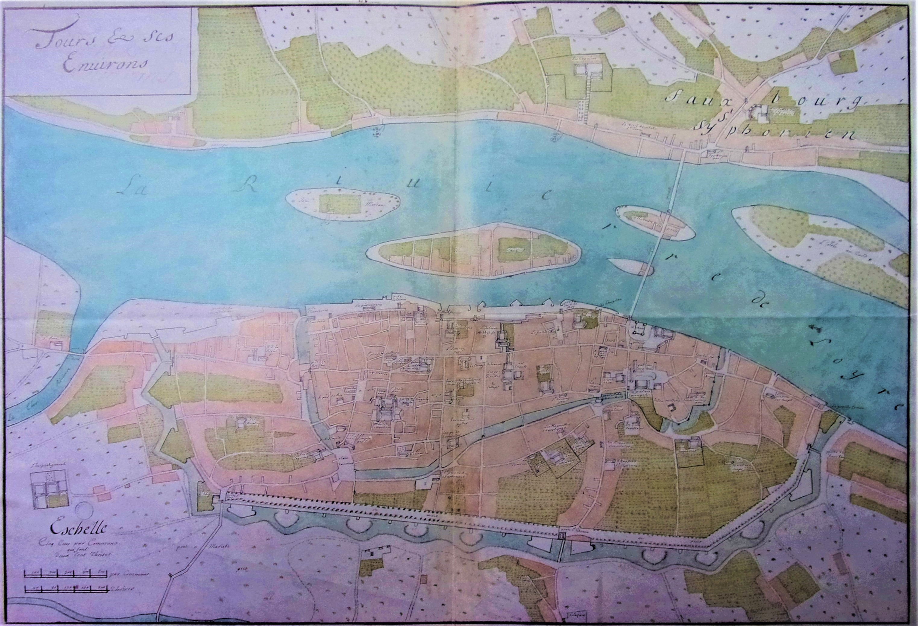 Plan de la ville de Tours